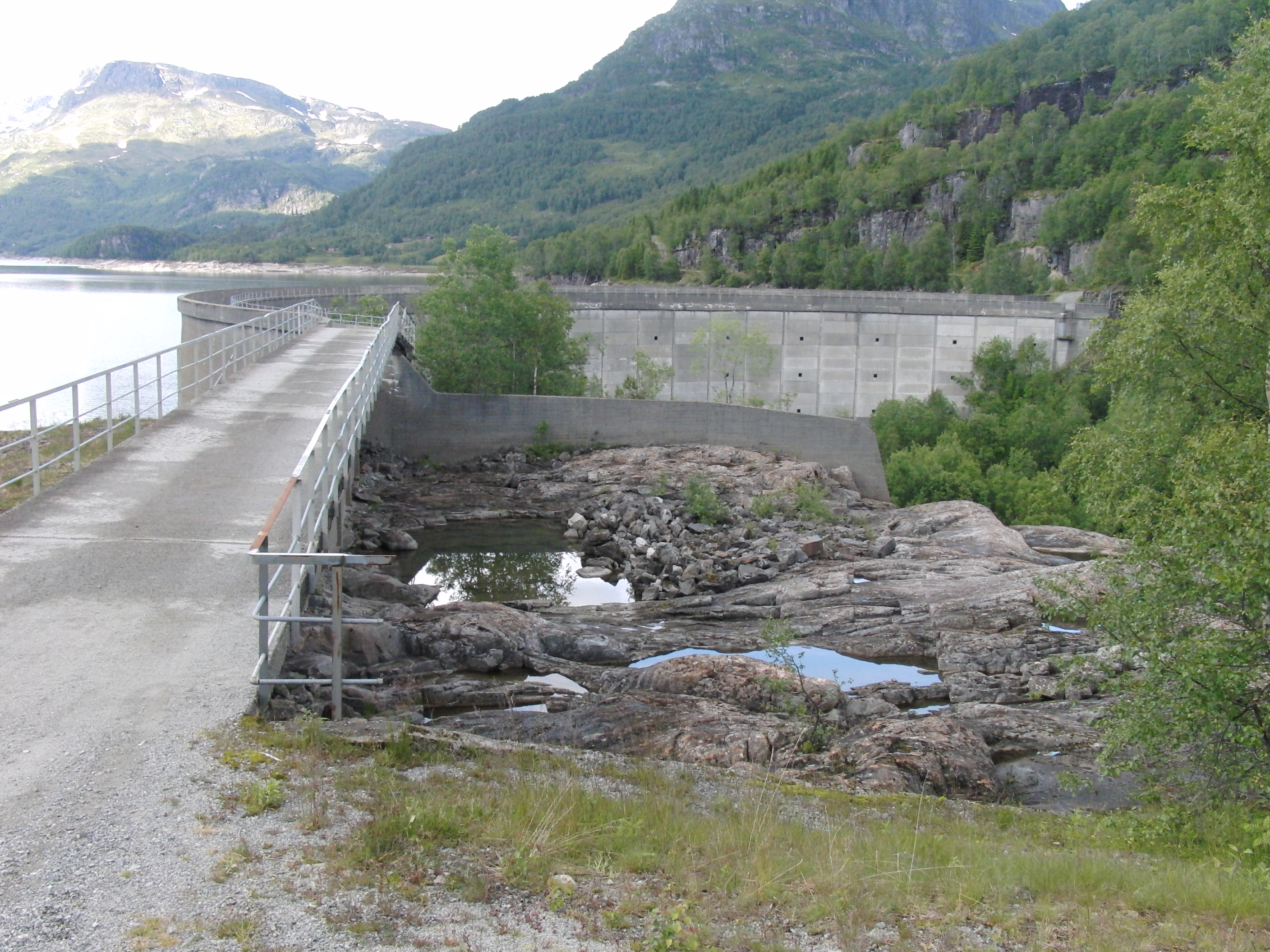 Slettedalsvatnet dam, for Storlivatn kraftverk (Sauda IV).